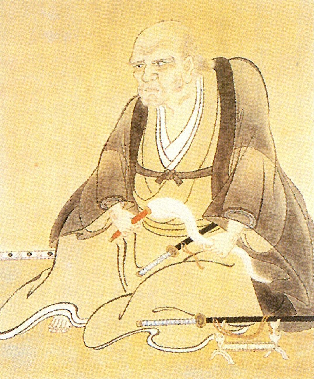 亀田藩主岩城重隆の肖像。